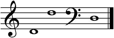 Nuty d na pięciolinii.